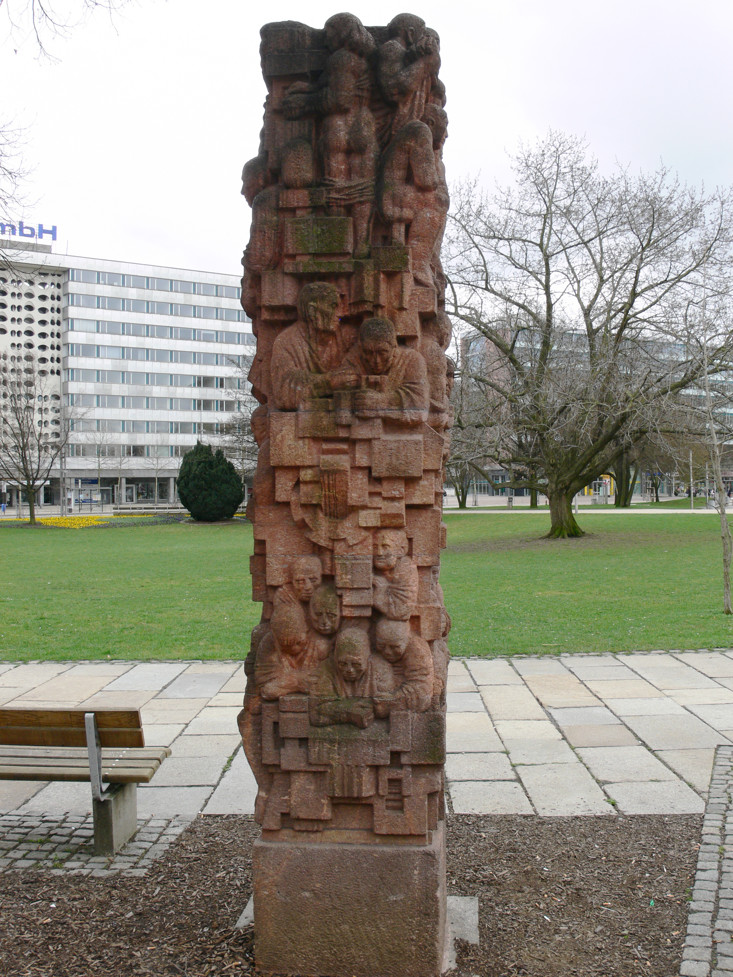 Chemnitz; Stadthallenpark Wieland Förster: Wissenschaft als Produktivkraft, Porphyr, 1974